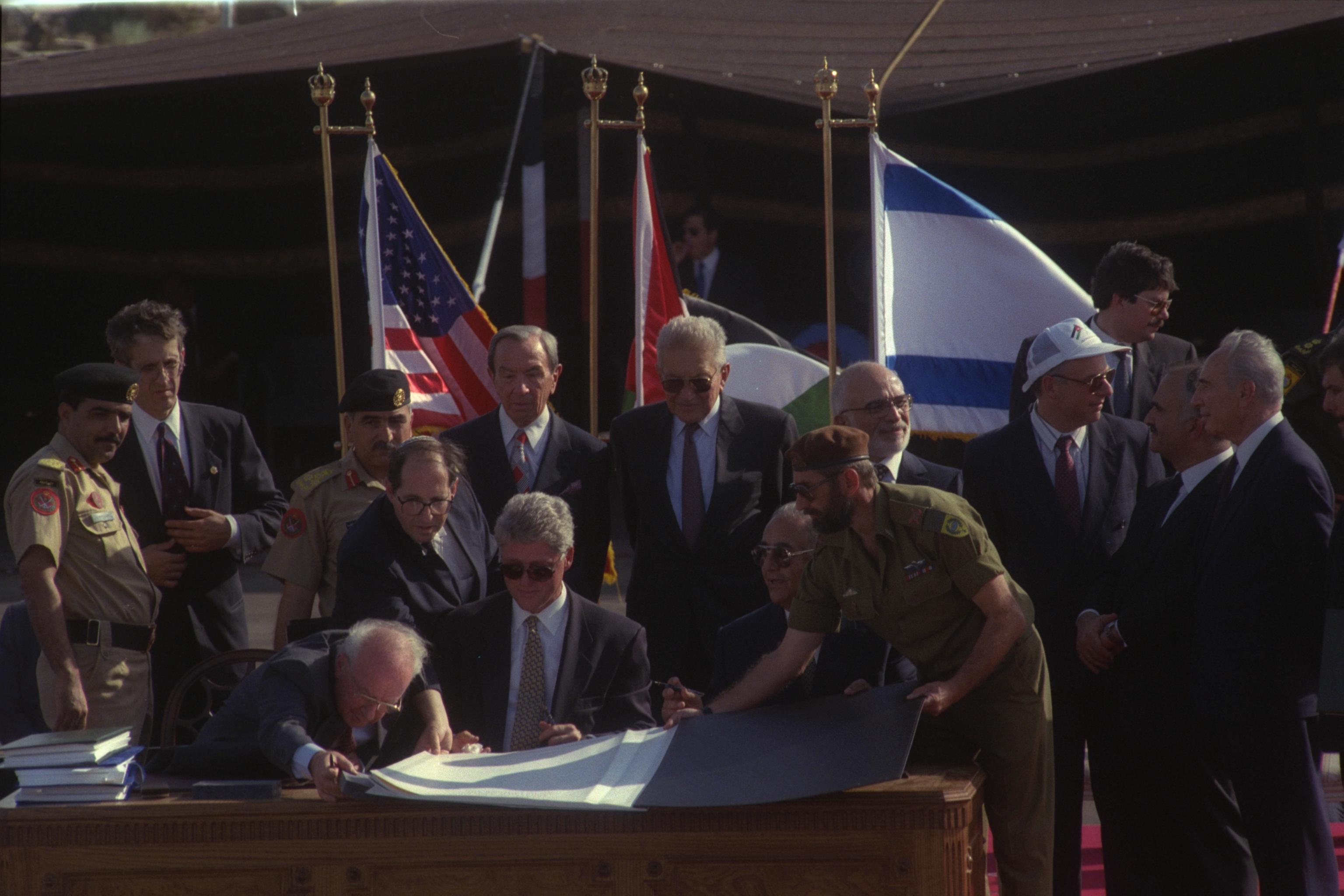 THE ISRAELI-JORDANIAN PEACE TREATY SIGNING CEREMONY AT THE ARAVA TERMINAL. טקס חתימת חוזה השלום בין ישראל וירדן במסוף הערבה